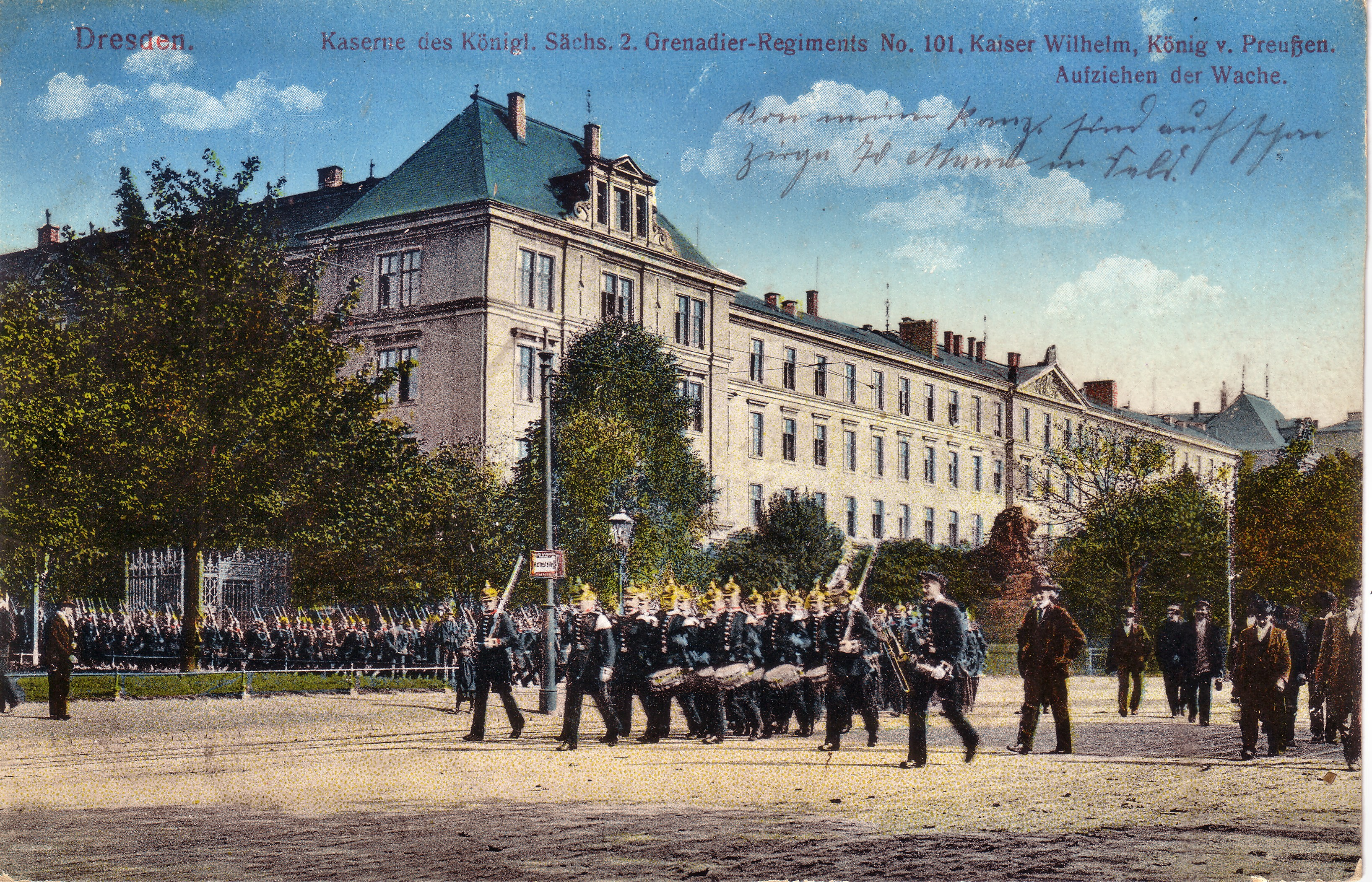 Kaserne des Königl. Sächs. 2. Grenadier-Regiments No. 101, Kaiser Wilhelm, König von Preußen, Aufziehen der Wache